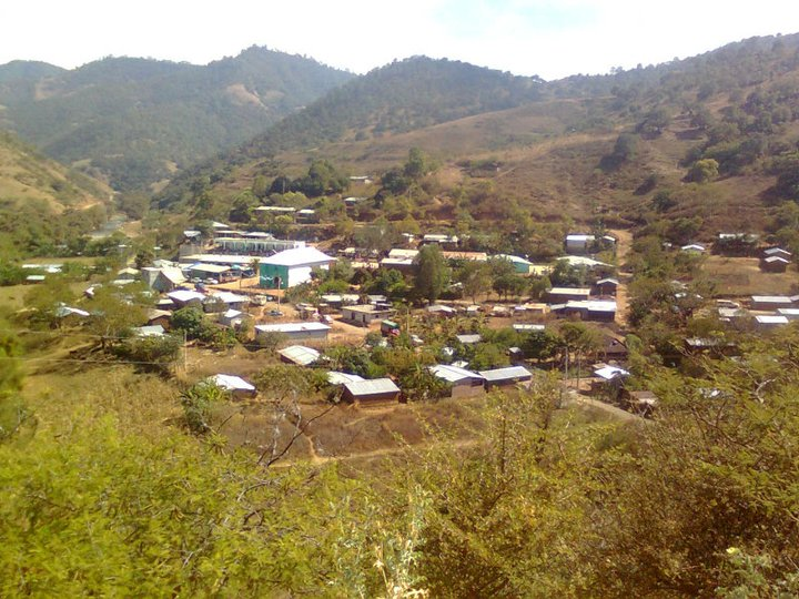 Vista del pueblo San Juan Yuta